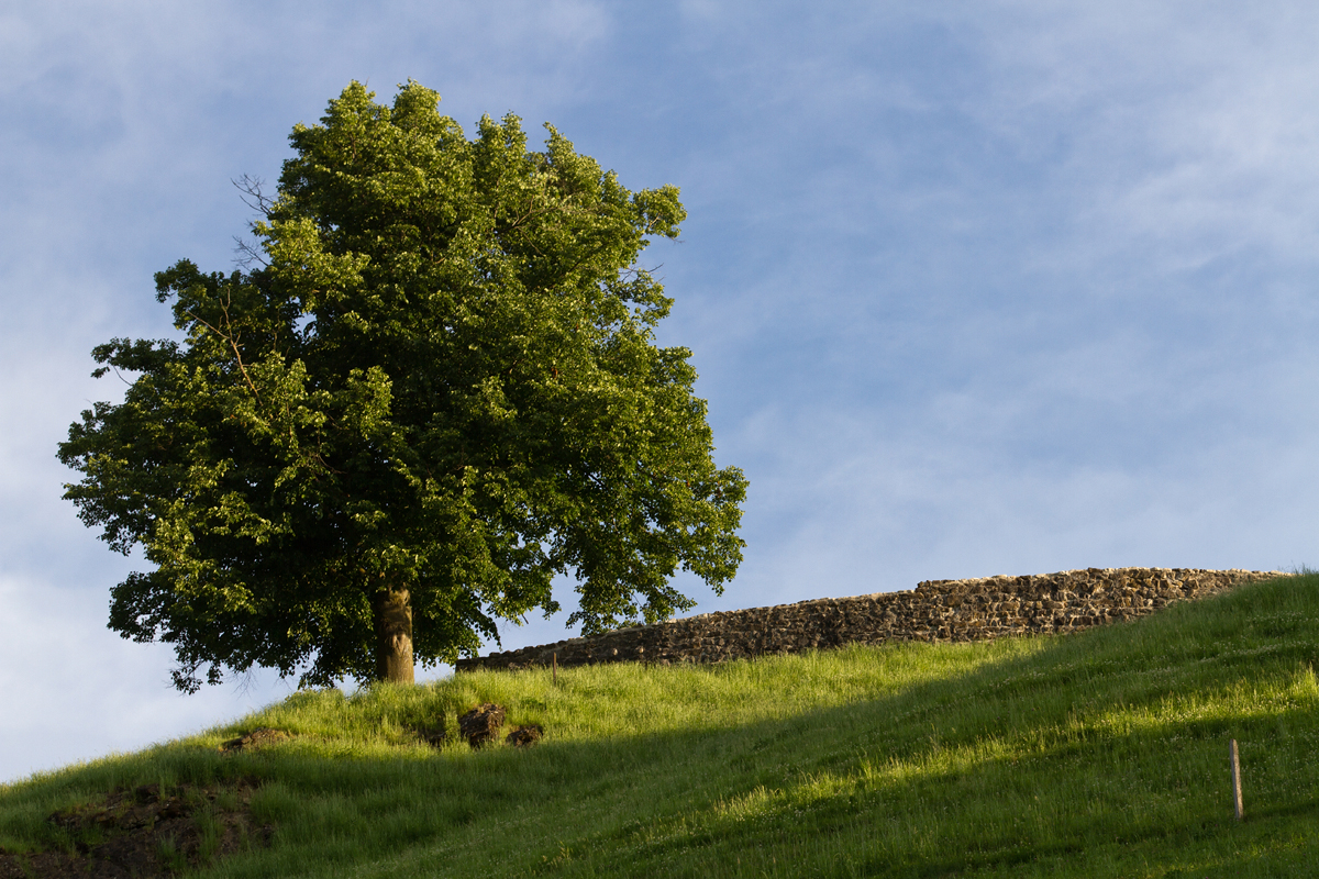 Burgruine Rotzberg in Ennetmoos (Kulturgut, Liste B)